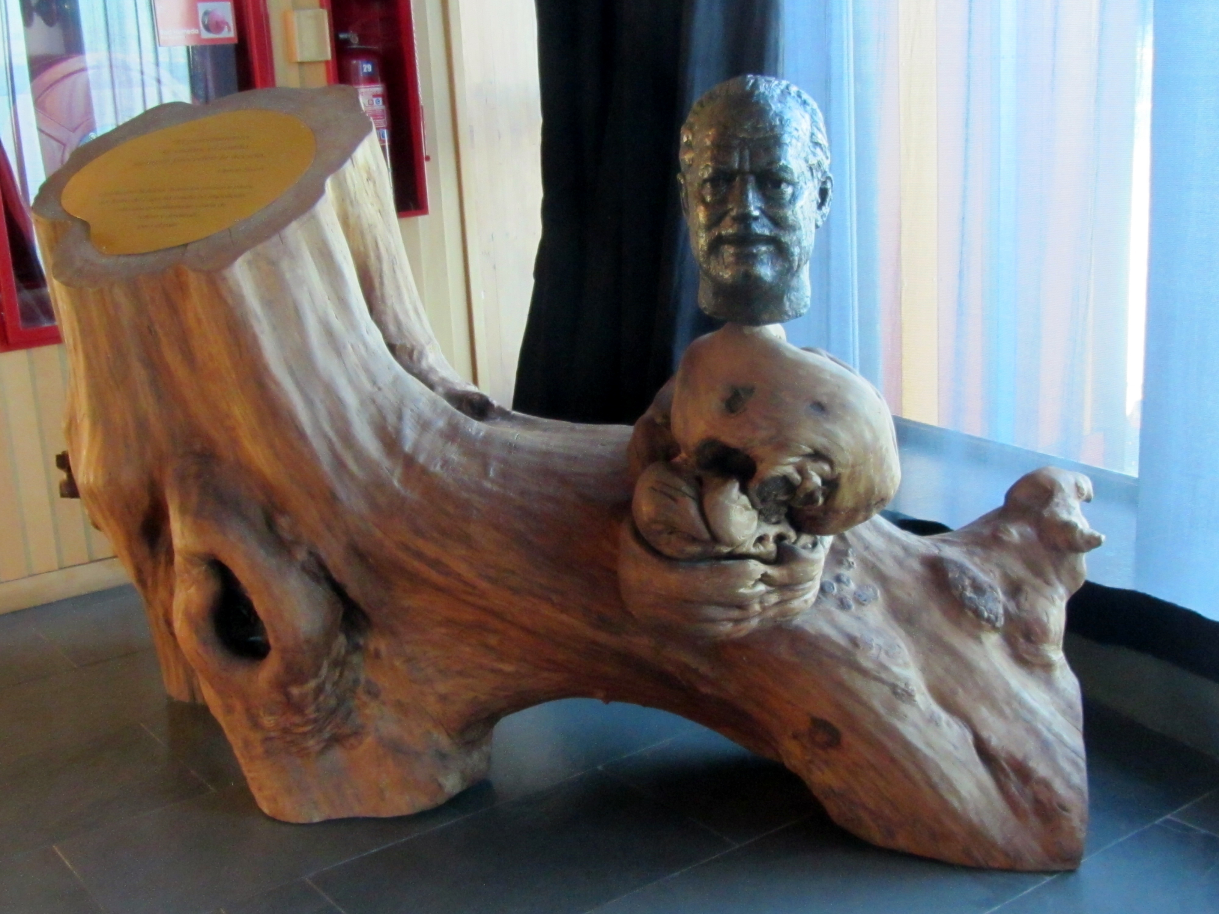 Busto de Guillermo Schiess en el foyer Volcán Osorno del Teatro del Lago en la ciudad de Frutillar, Chile.